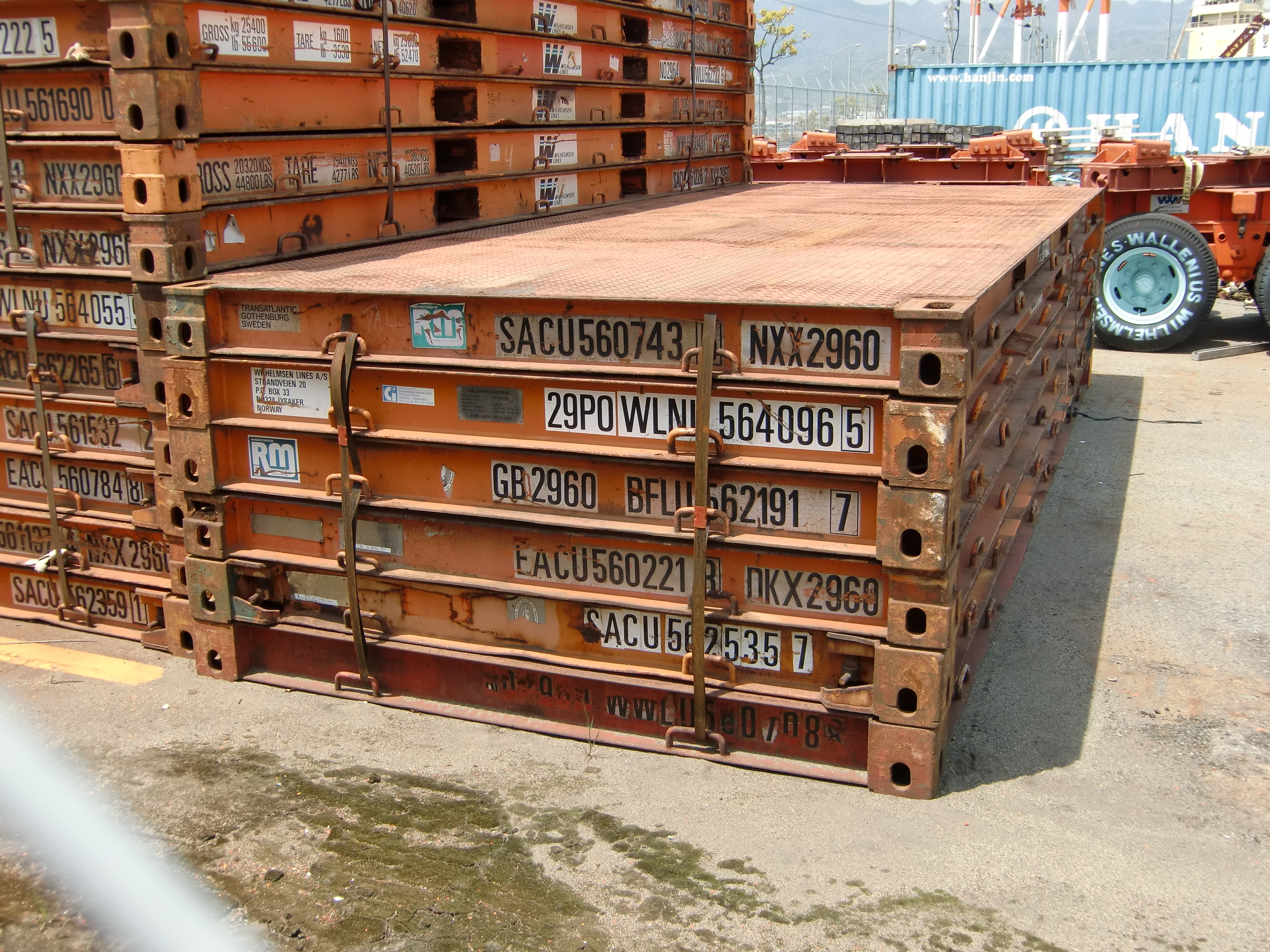 兵庫県／神戸港六甲アイランド